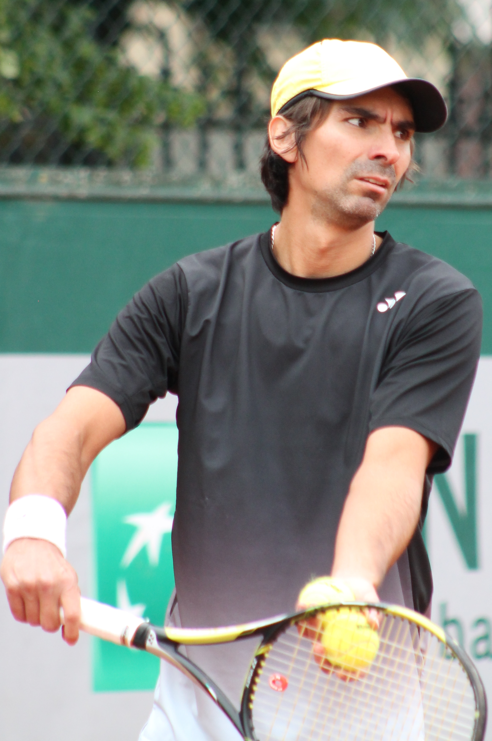 Peralta RG16 (9)